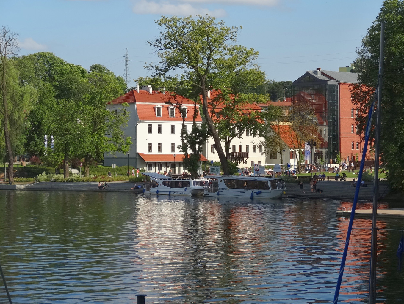 Nabrzeże północne Wyspy Młyńskiej w Bydgoszczy